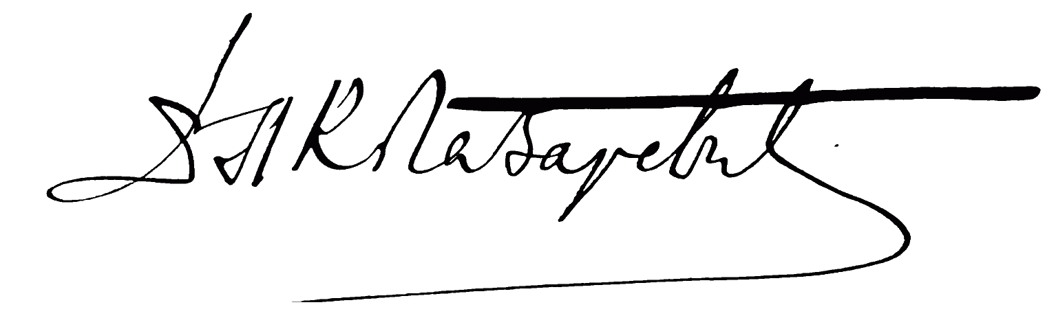 Dr. L. K. Lazarević (signature)